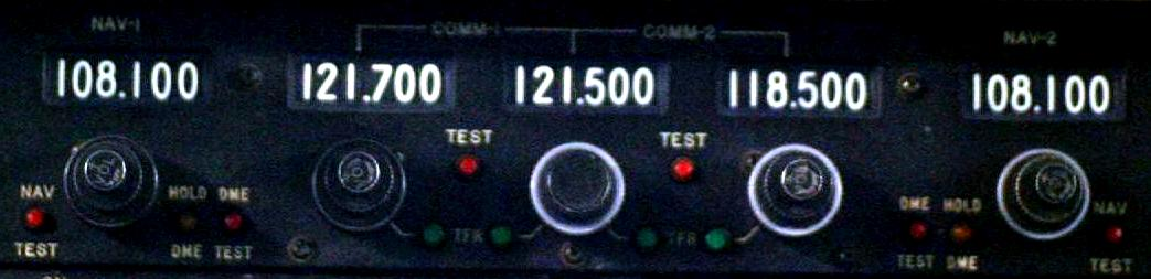 Station aéronautique du porteur 700, British Aerospace.